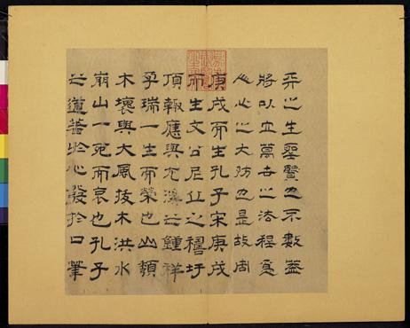 中文（中国大陆）: 唐元书法作品，现藏台湾故宫博物院。